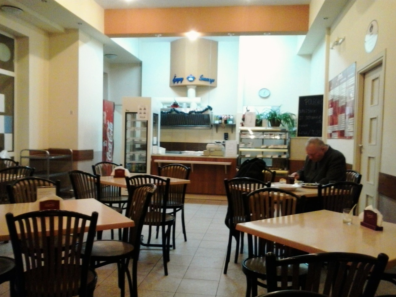 Bar mleczny Kalina na Dębcu w Poznaniu.